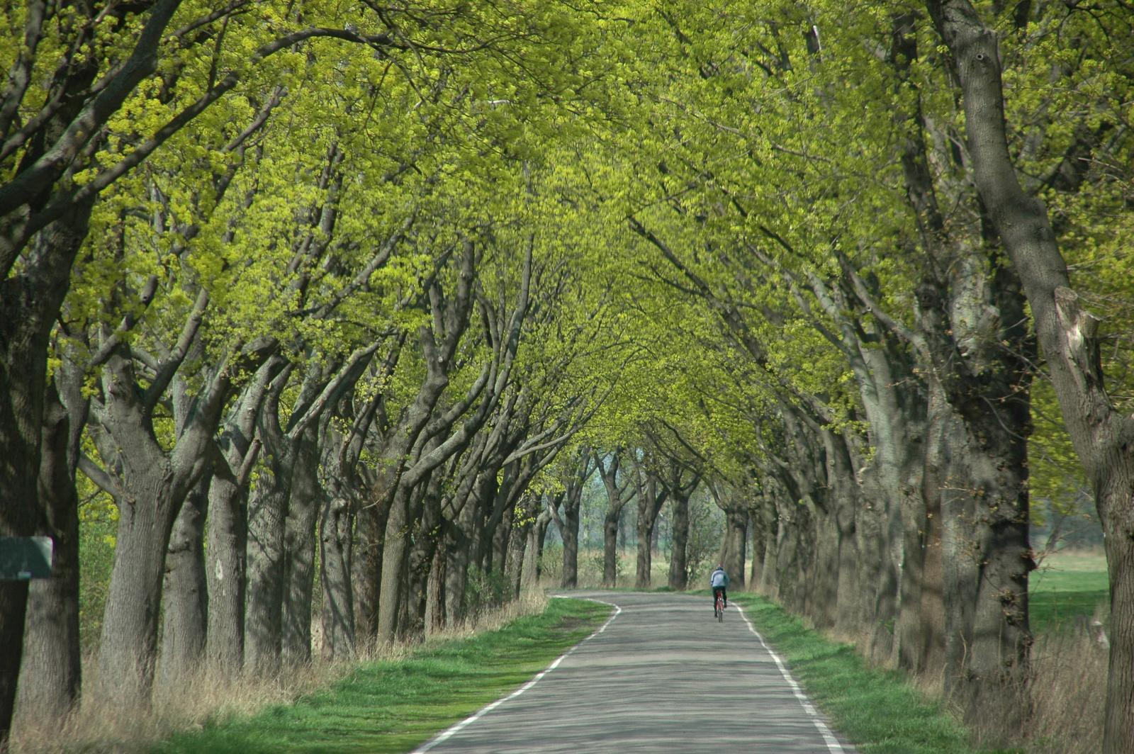 Linumhorster Straße, Ortsteil Linumhorst - Kremmen, Allee des Jahres 2011, ausgezeichnet vom BUND